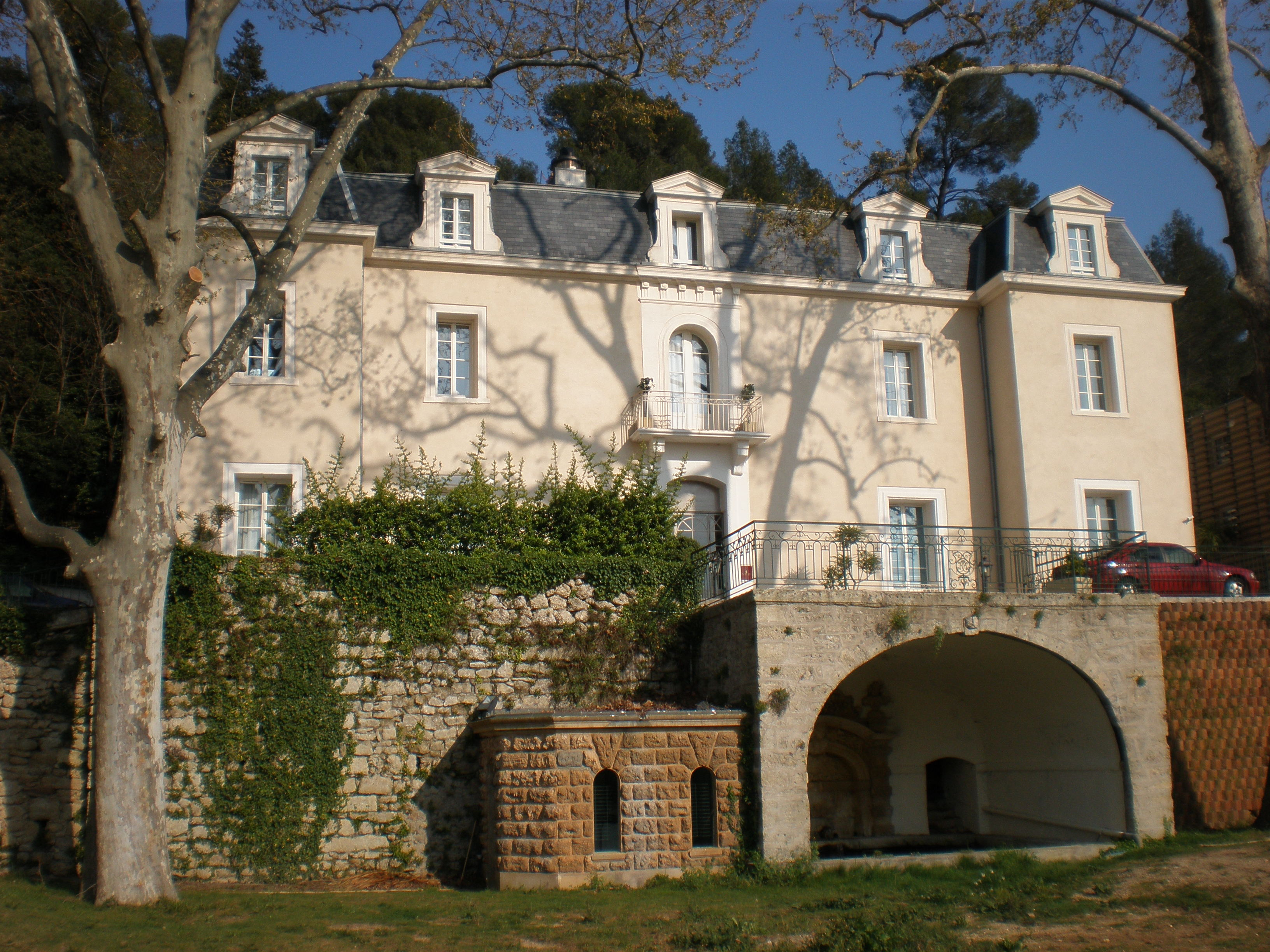 Le château de Bionne (Montpellier - Hérault)